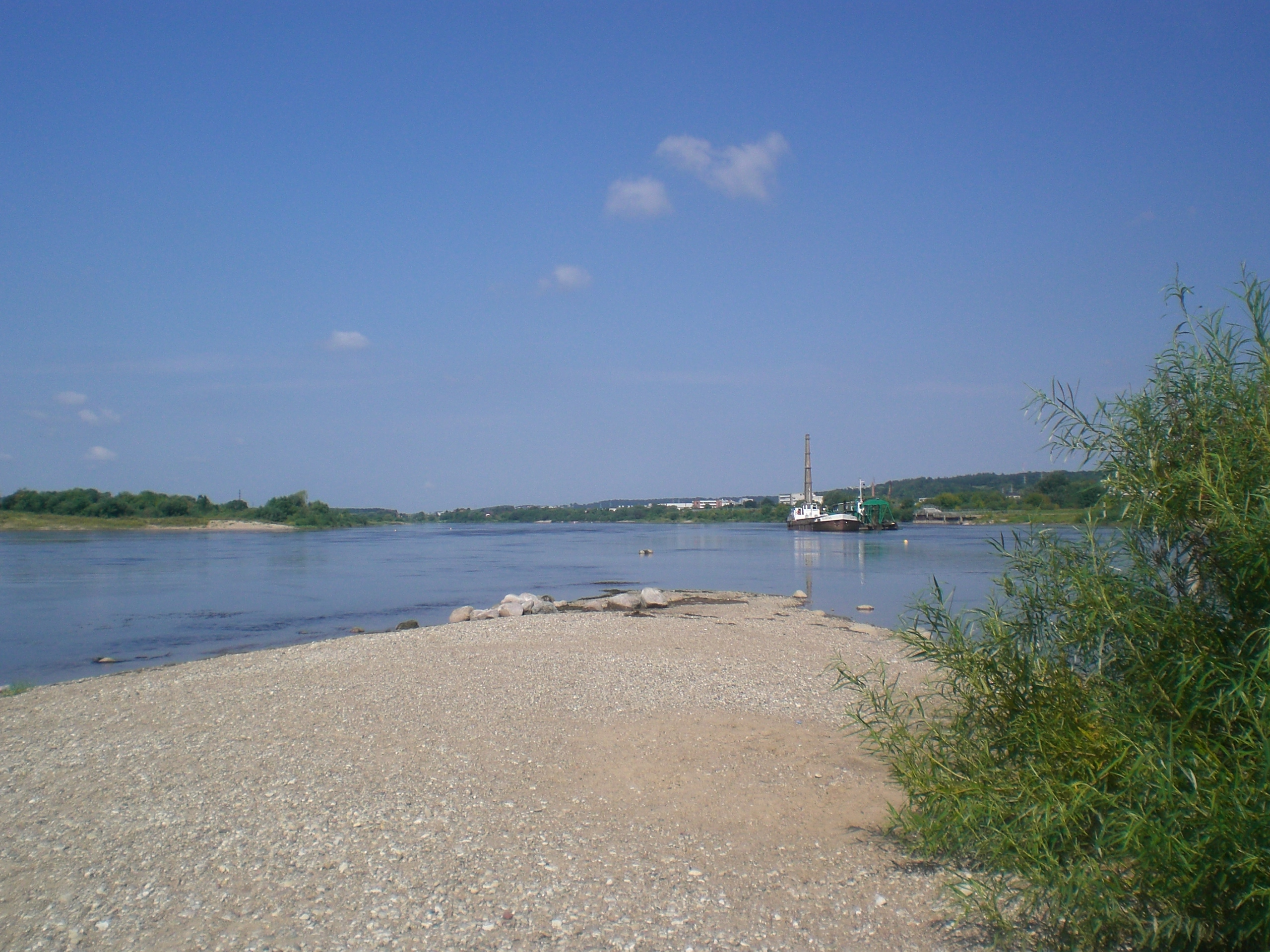 kunfluejo de la riveroj Nemunas (maldekstre) kaj Neris (dekstre) en Kaŭno Fonto: propra foto